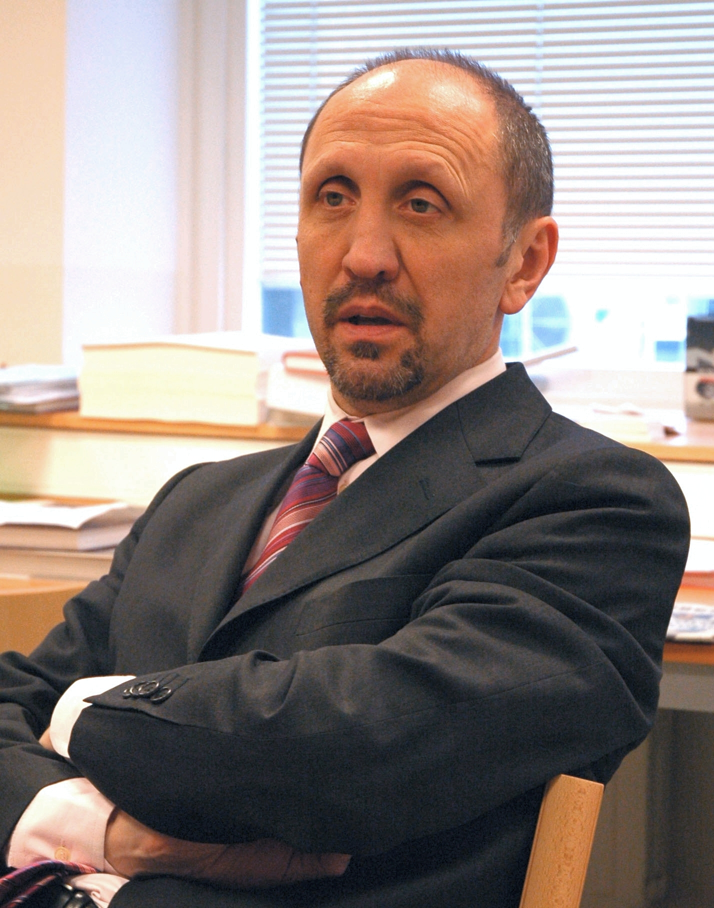 Johan Vande Lanotte, Belgisch minister van Staat